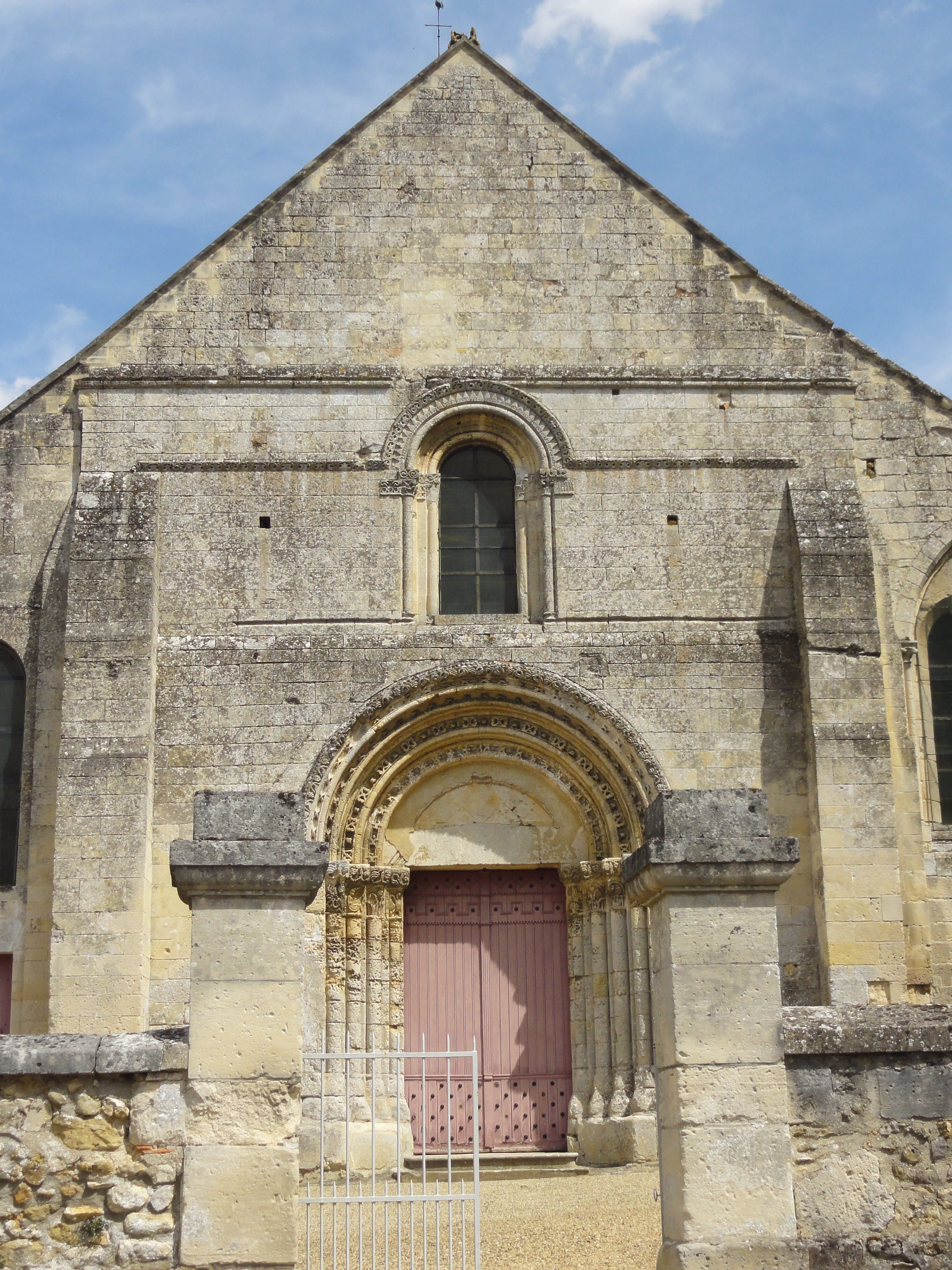 Église Saint-Vast de Nointel (voir titre).